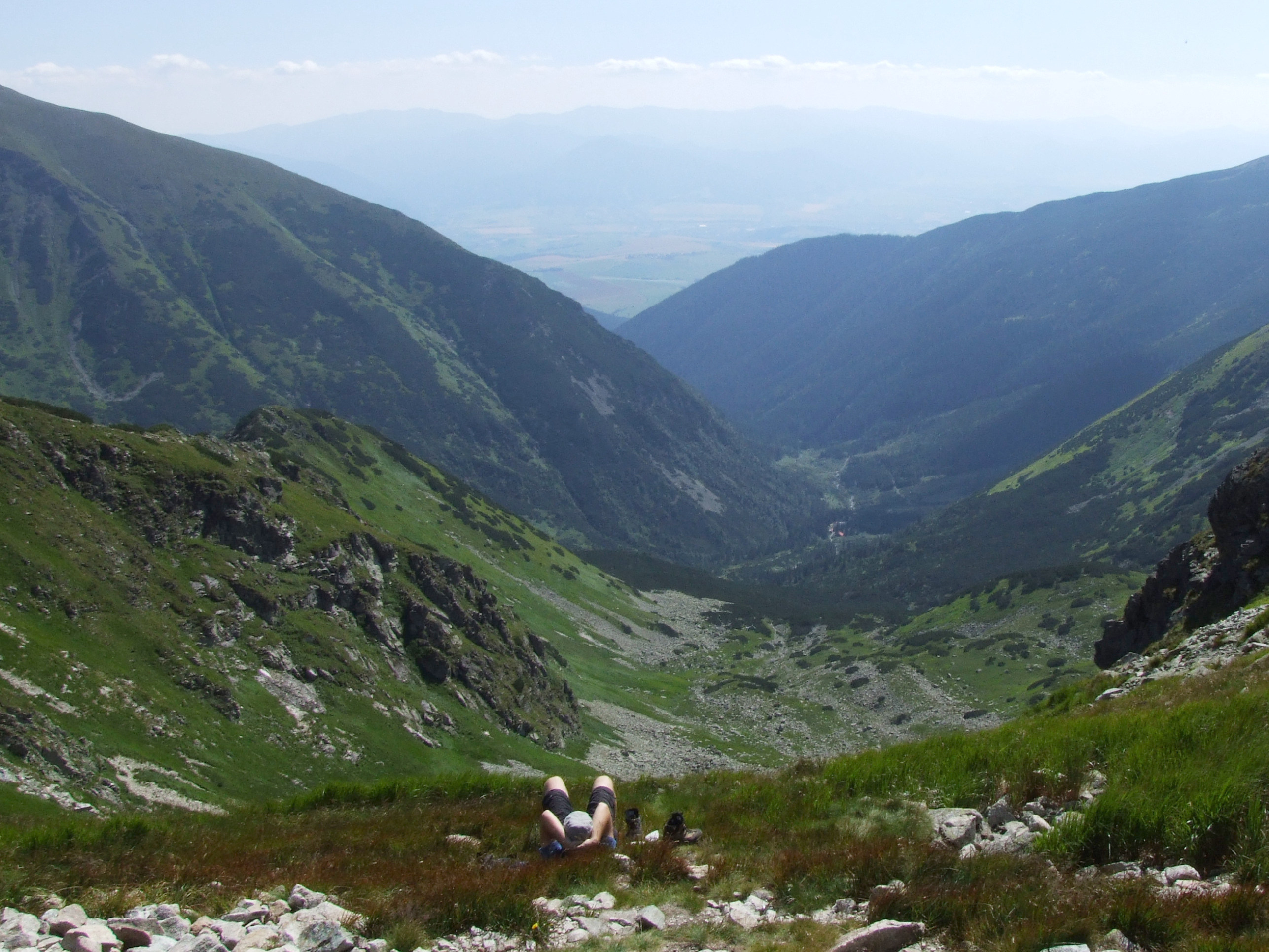 Żarska Dolina (West Tatra Mountains) Pohľad na Žiarsku dolinu z cesty na Smutné sedlo. (Červená strecha je Horská chata, hneď vedľa ktorej sa nachádza Žiarska chata (1325 m n.m.), ale má tmavú strechu... (in english: View of Žiarska dolina from Smutné sedlo, you can see red roof of Horská cottage, near which you can get an accommodation in "Žiarska chata")